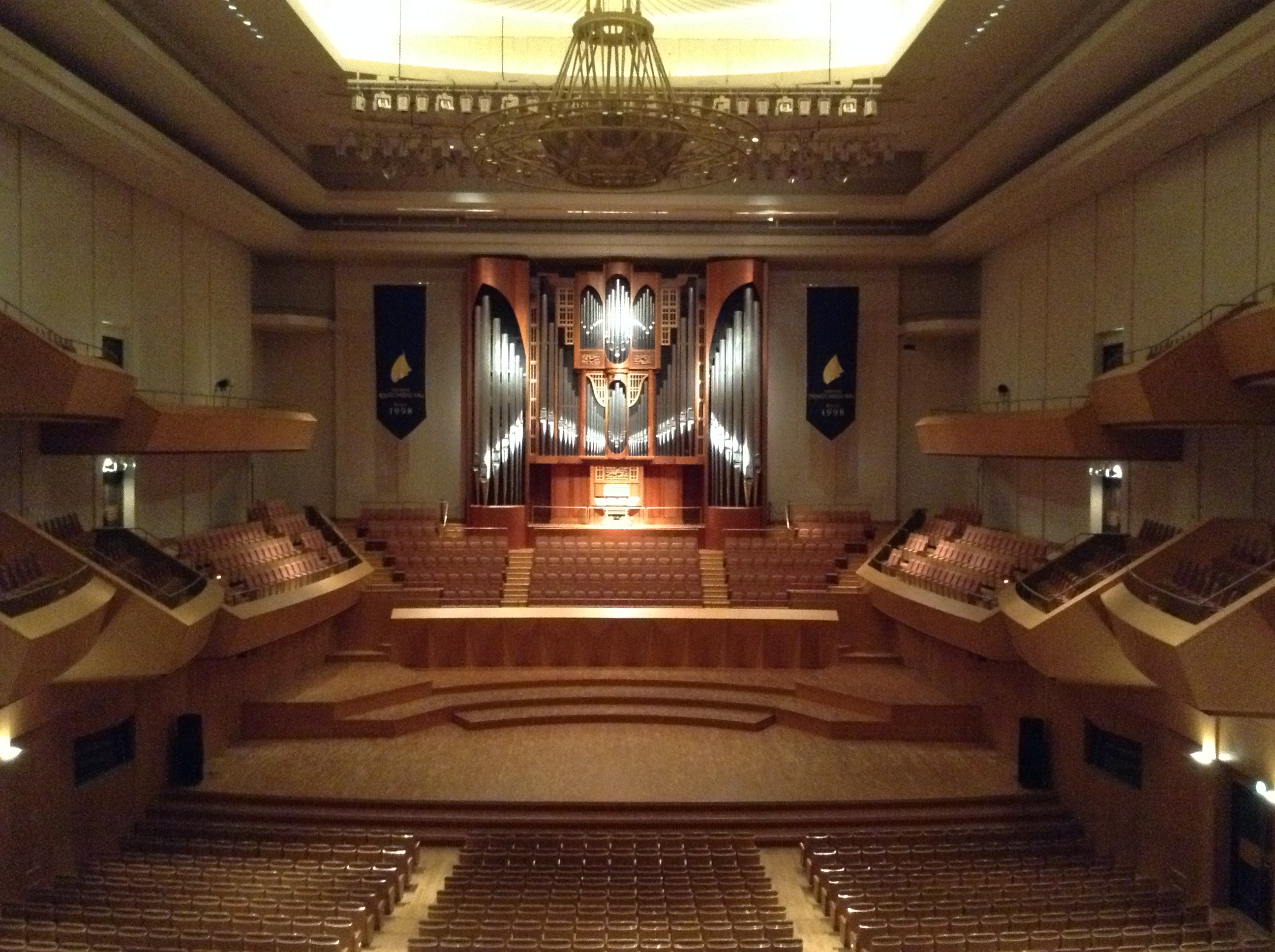 横浜みなとみらいホール 大ホールの全景。